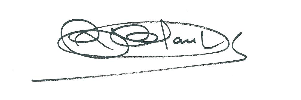 Firma de Rafael Clavijo.